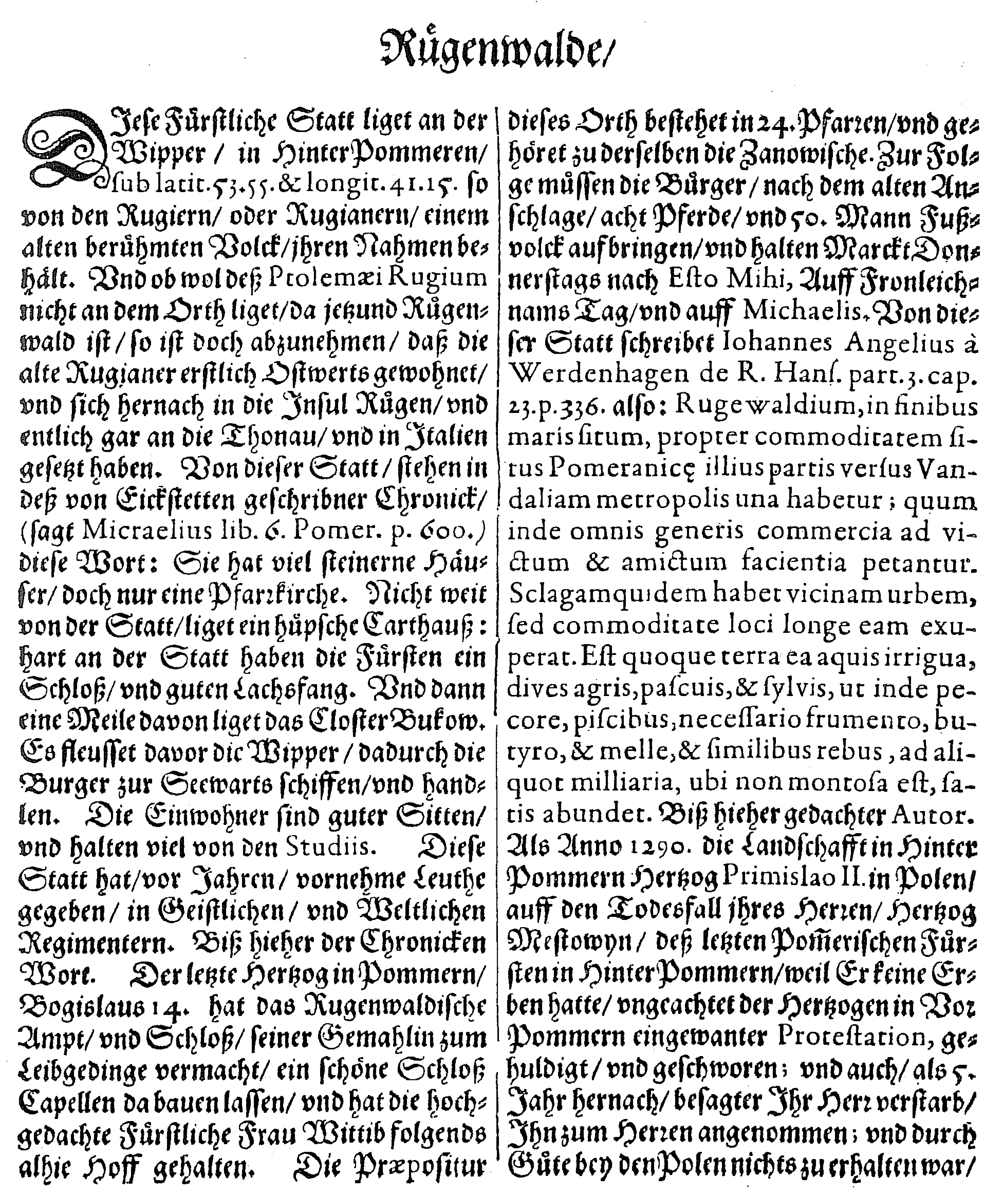 Beschreibung der Stadt Rügenwalde nach M. Merian aus dem Jahr 1652, Seite 1